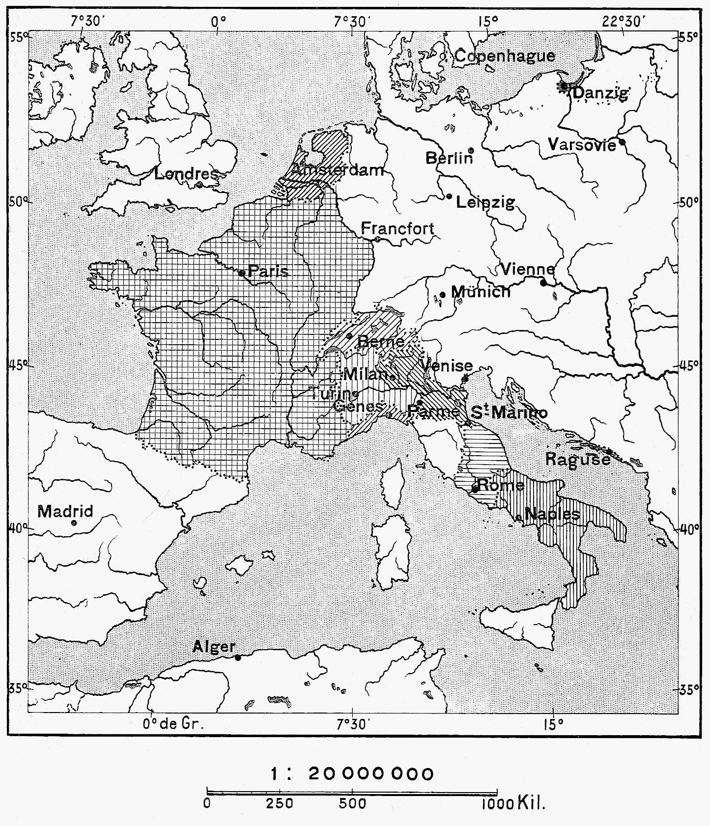 N° 435. Les républiques sœurs. La république Batave vécut de 1795 à 1806 ; la république Helvétique se transforma en 1798 ; la république Cispadane, formée le 16 octobre 1796 au sud du Pô, s’incorpora dans la république Cisalpine ; celle-ci, fondée le 9 juillet 1797, devient, en 1802, la république Italienne avec Bonaparte pour président. La république Ligure date du 5 juin 1797 et se fondit dans l’empire en 1805. La république Romaine dura du 13 février 1798 au mois de septembre 1799 ; la république Parthénopéenne vécut du 23 janvier au 13 juin 1799.